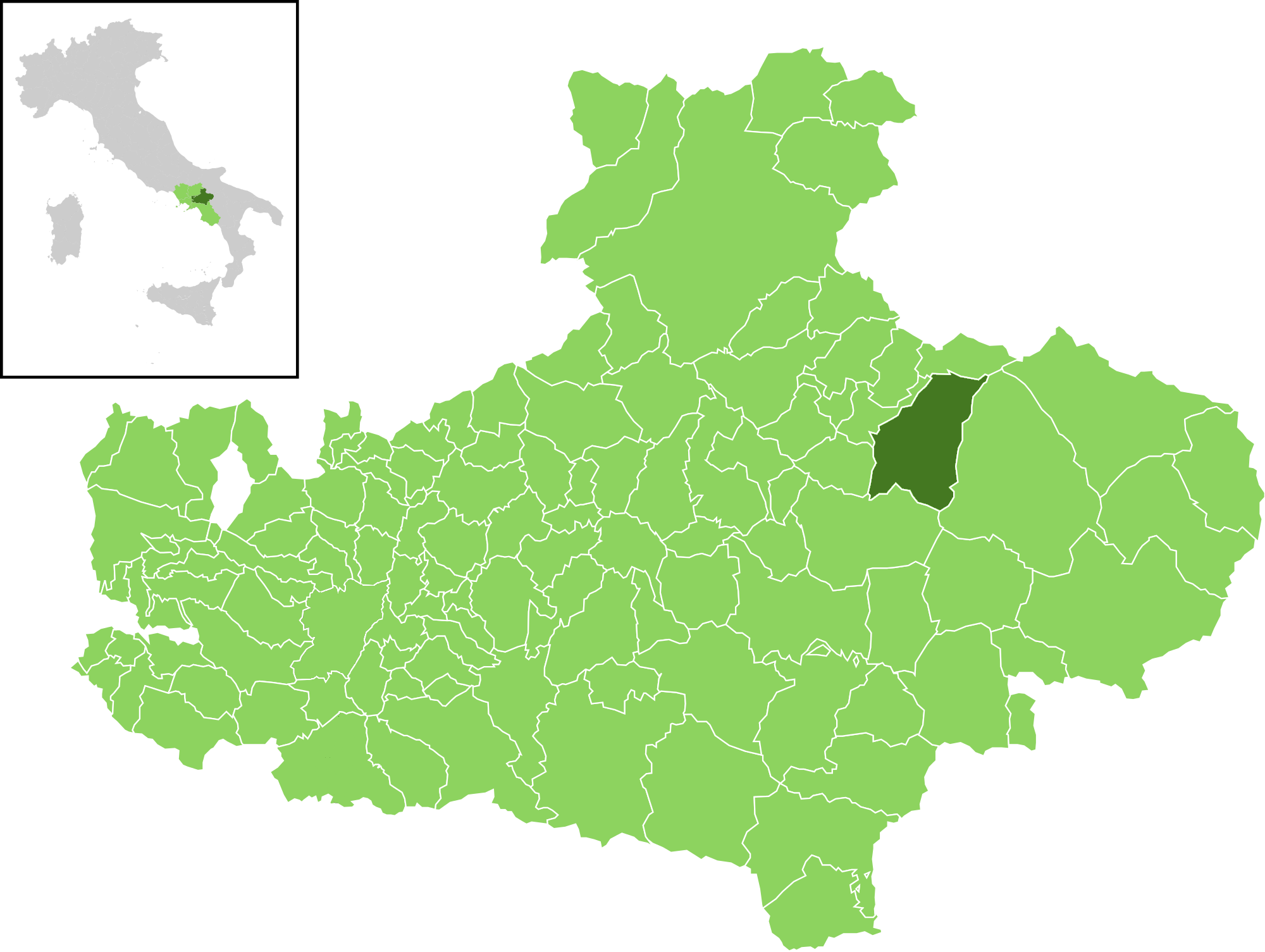 Posizione del comune all'interno della provincia di Avellino